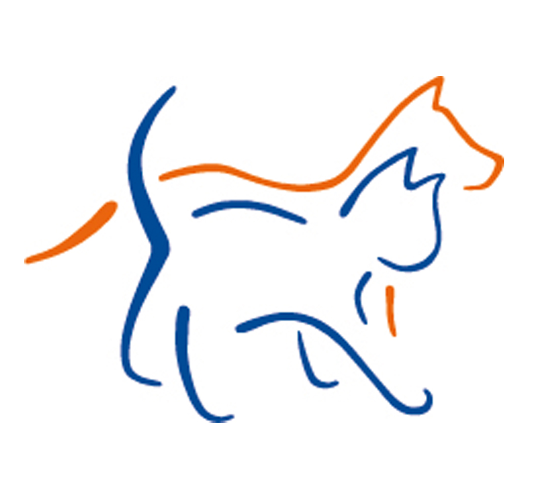 Deitsch: Das Stiftungslogo der Susy Utzinger für Tierschutz